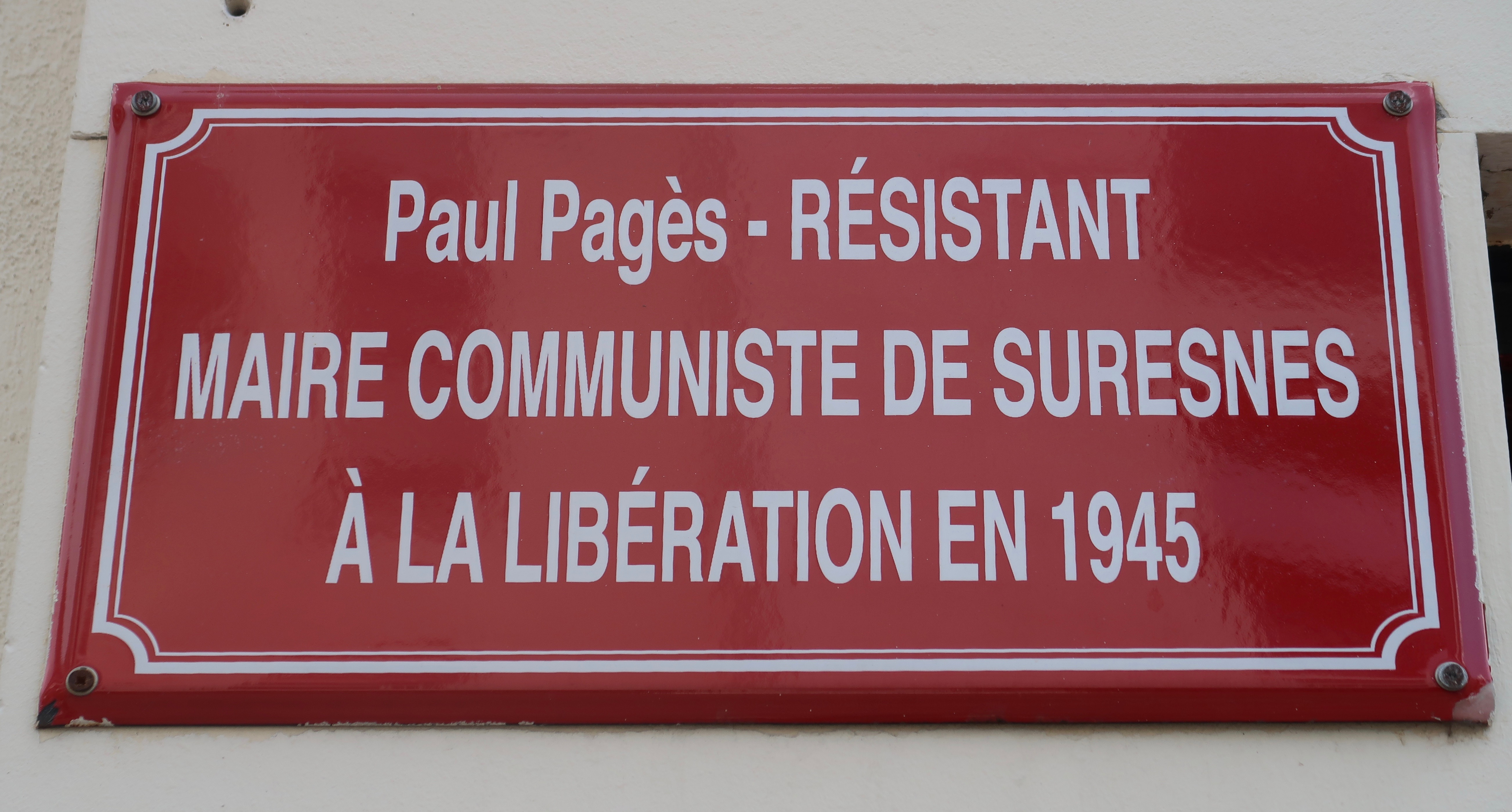 Plaque en hommage à Paul Pagès, au siège de la section Parti communiste français à Suresnes (Hauts-de-Seine), 42 bis rue de Verdun.